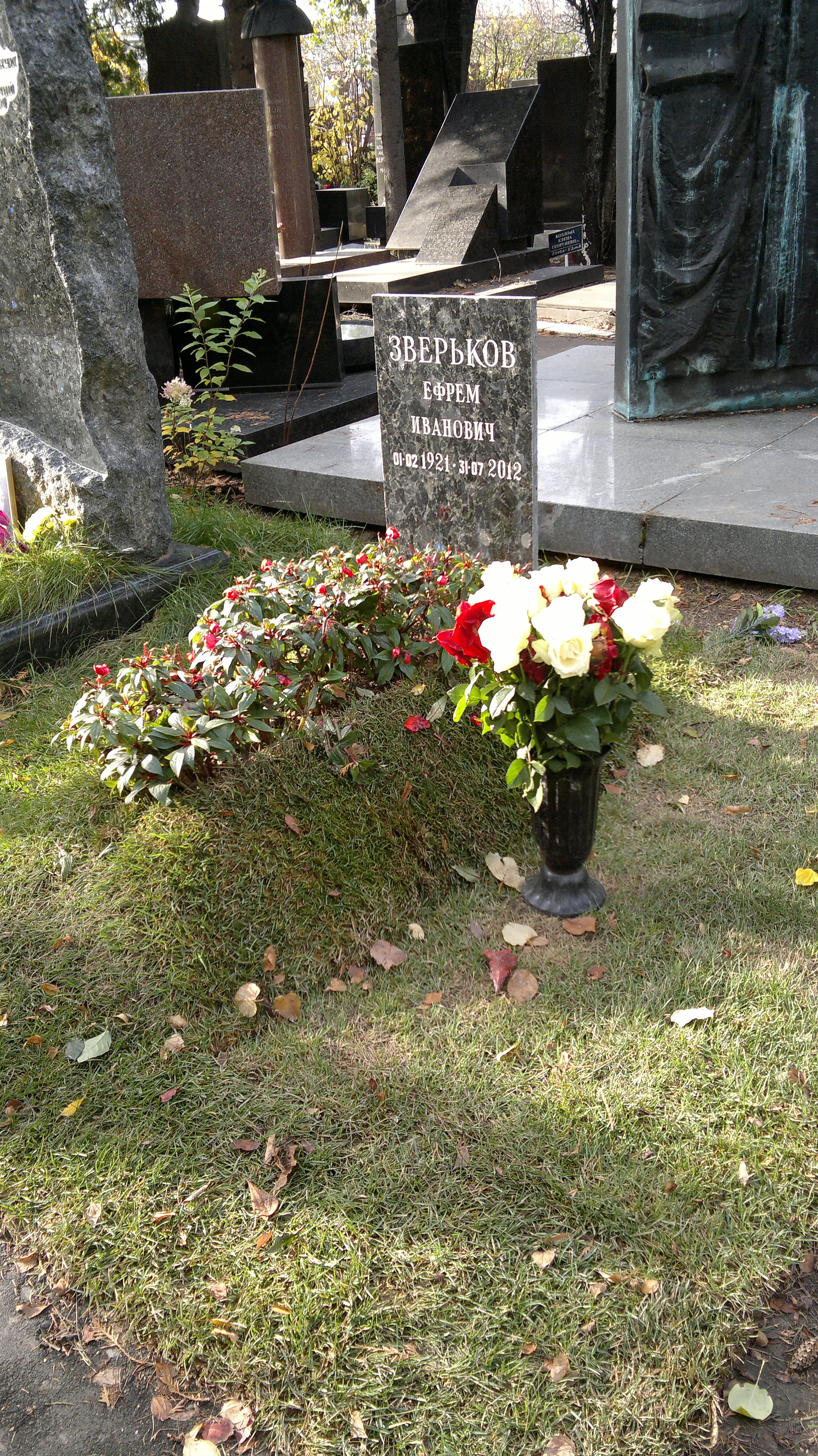 Могила Еврема Зверькова на Новодевичьем кладбище